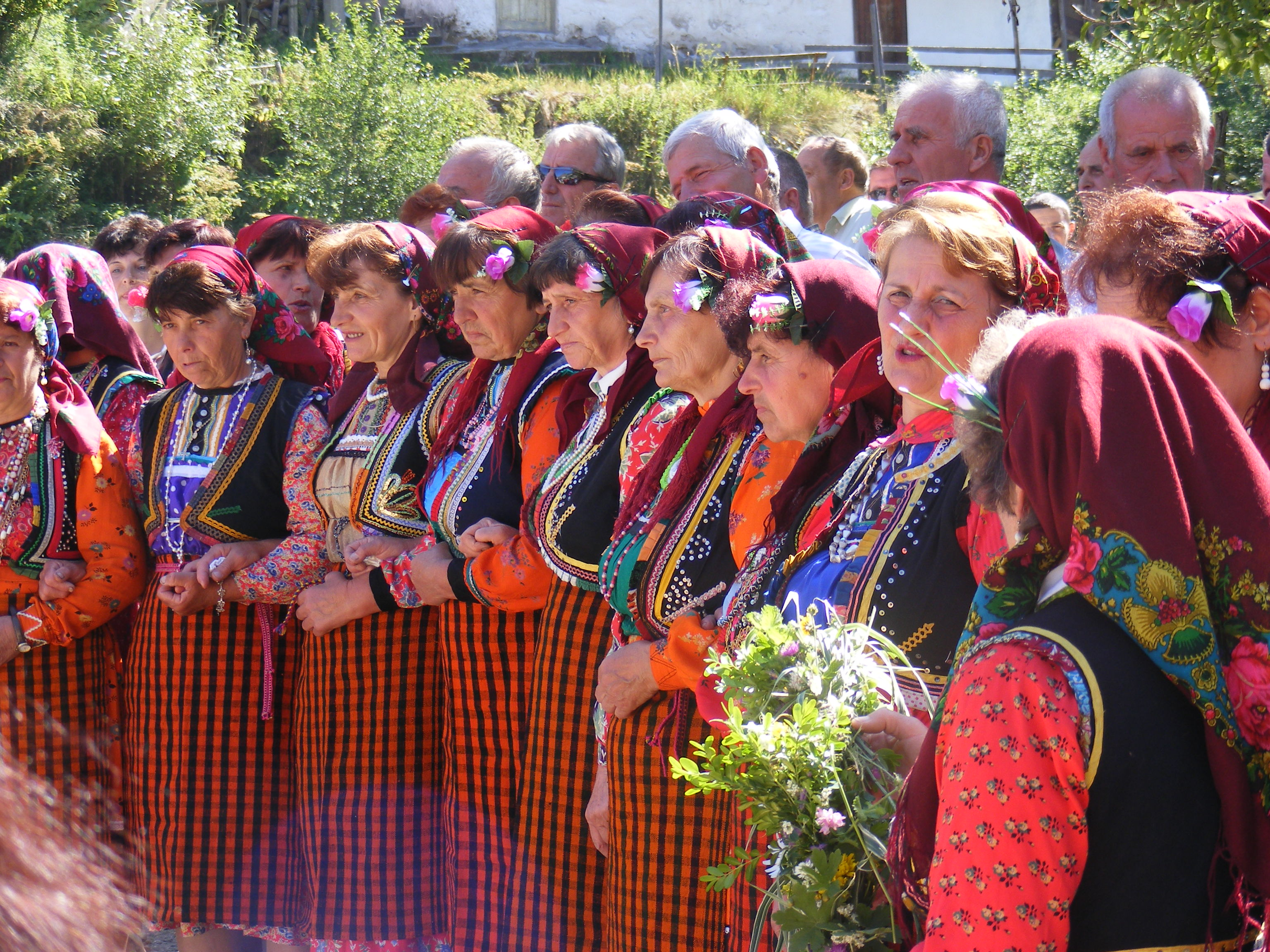 Мугленци от ХХІ век